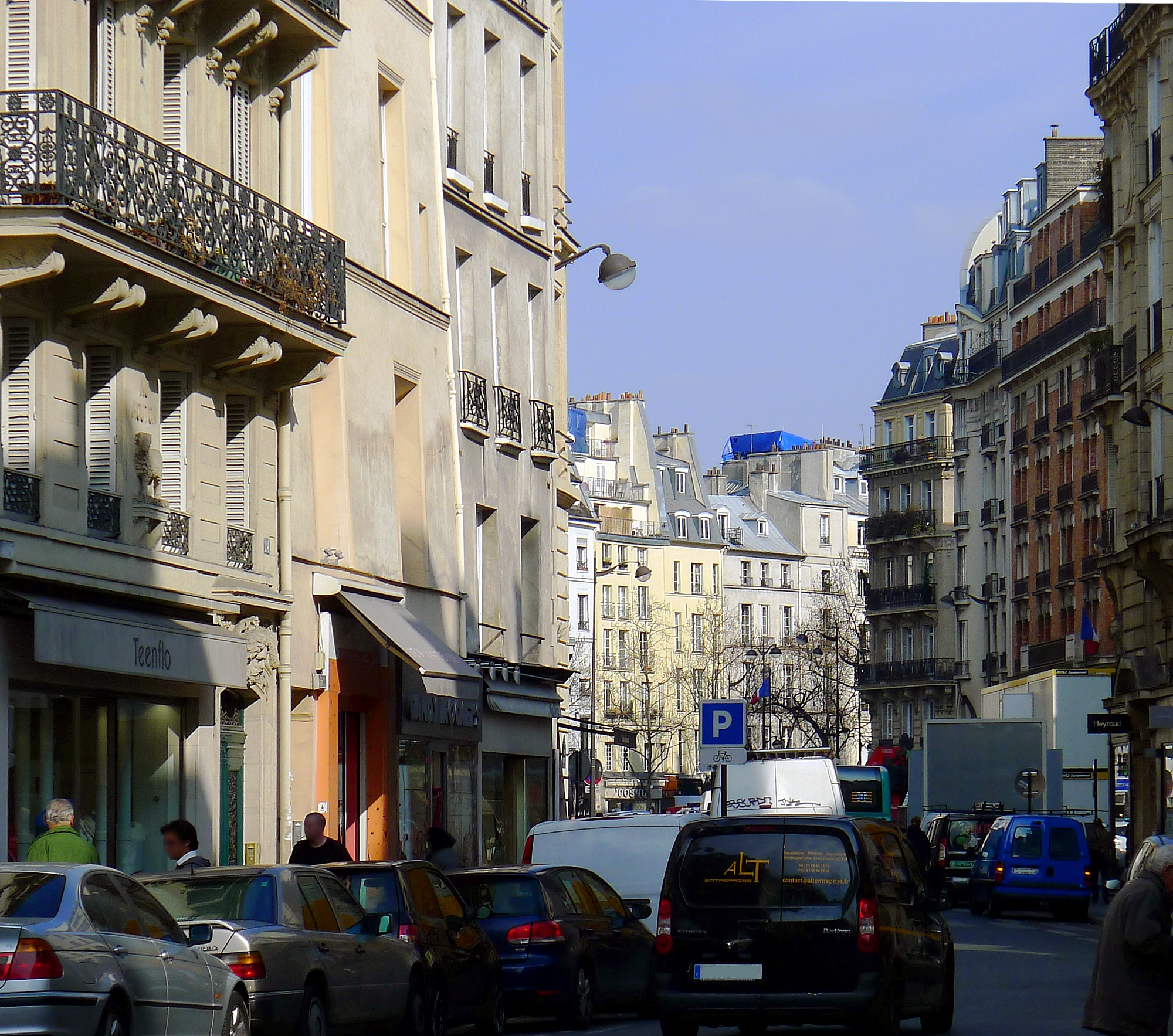 Rue du Four - Paris VI